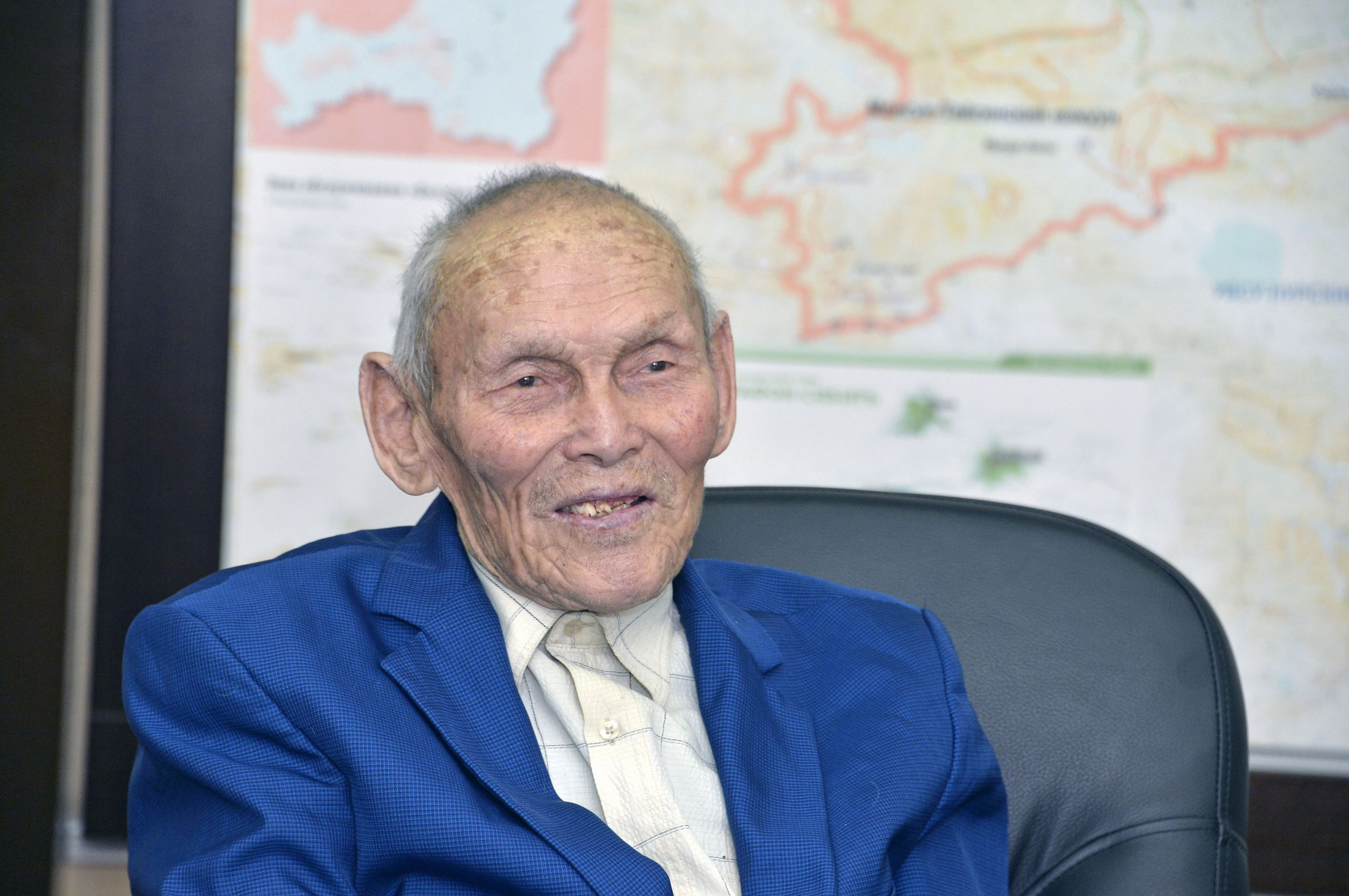 Саая, Когел Мижитеевич, 86 лет. На встрече с Главой Республики Тыва Ш.В. Кара-оолом